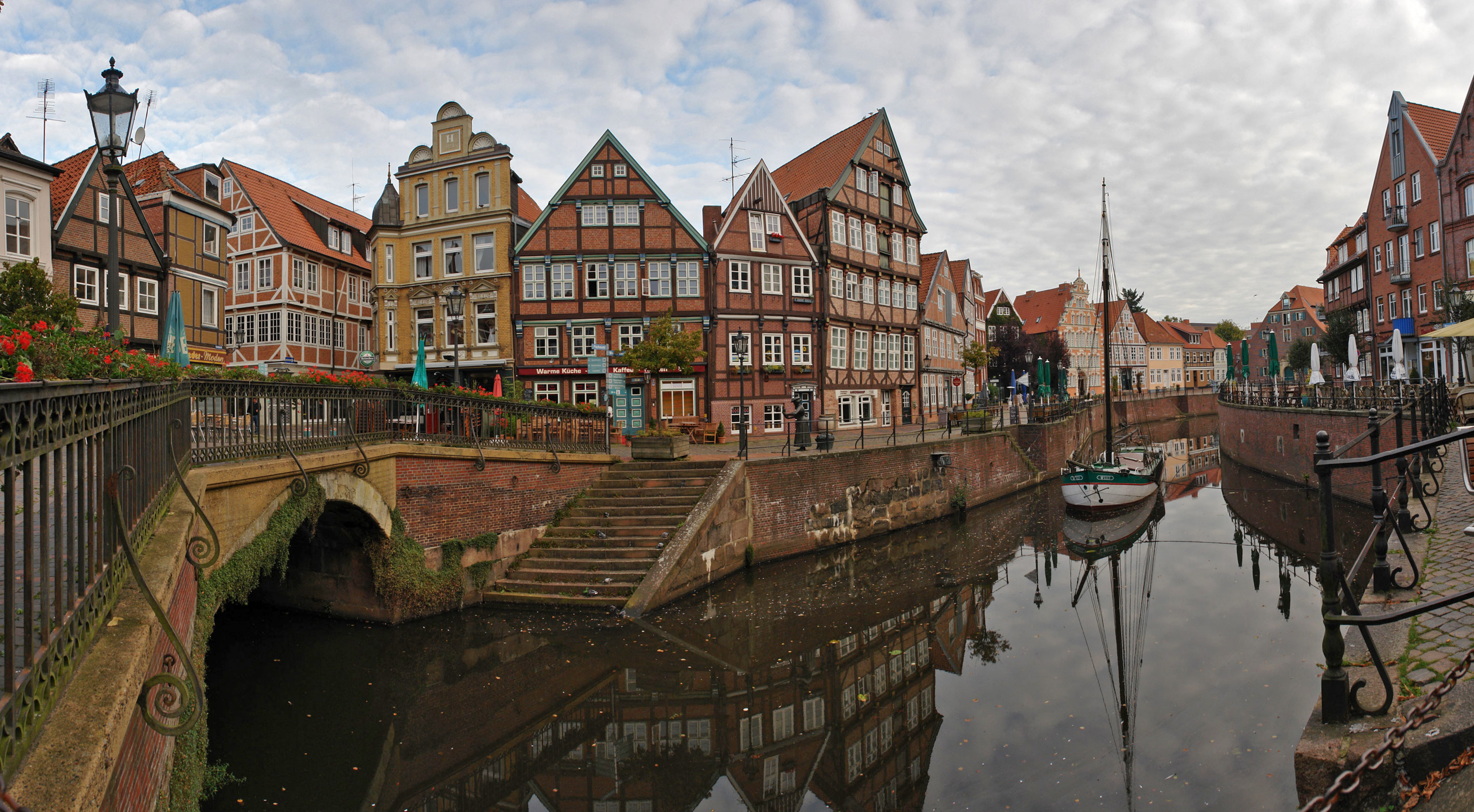 Hansehafen mit Hudebrücke und den Straßen Wasser-West und Wasser-Ost in Stade